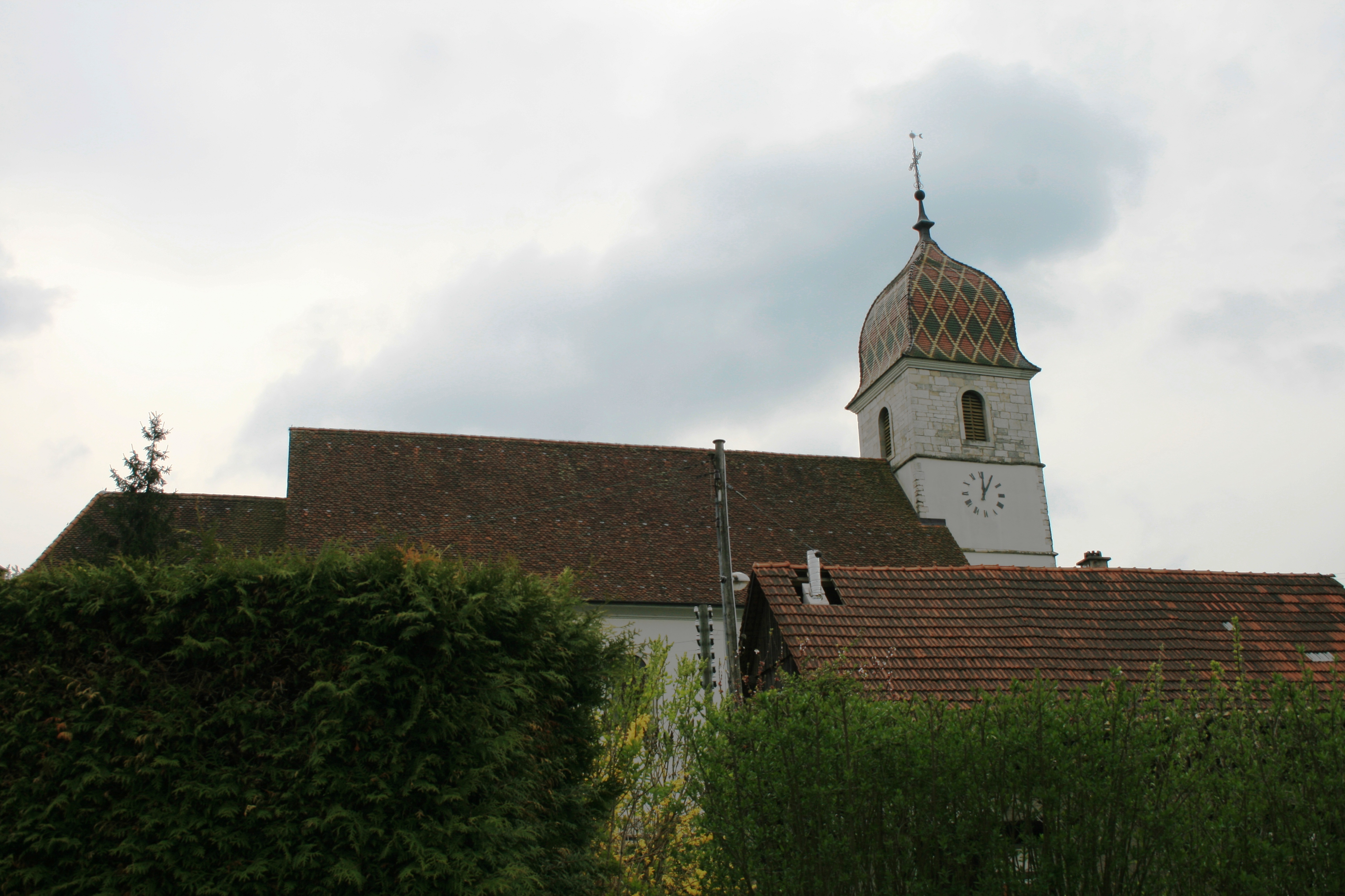 Eglise de Bonfol JU, Suisse